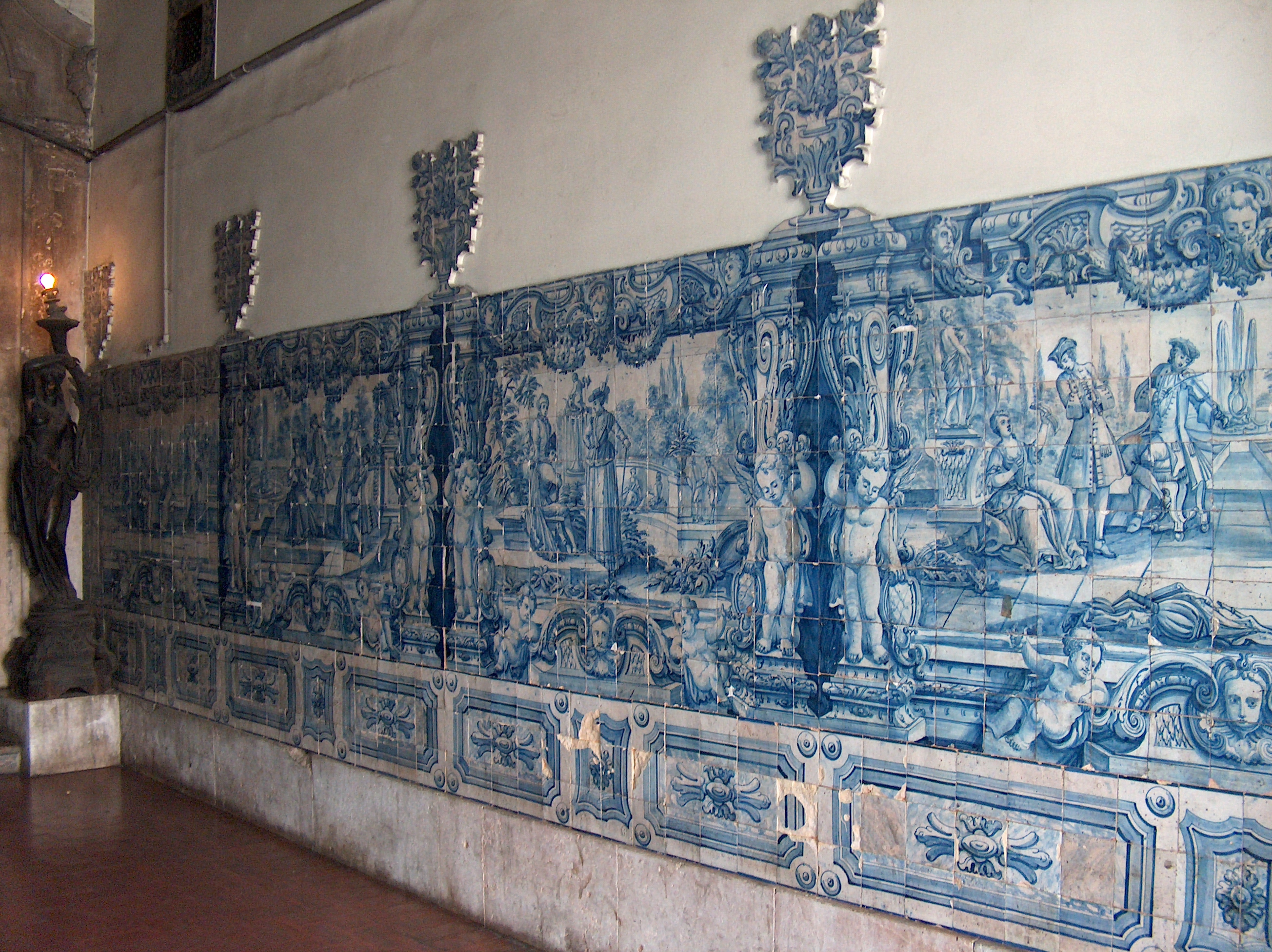 Palácio Valada-Azambuja. Azulejos setecentistas do Palácio Valada-Azambuja, Lisboa, Portugal.